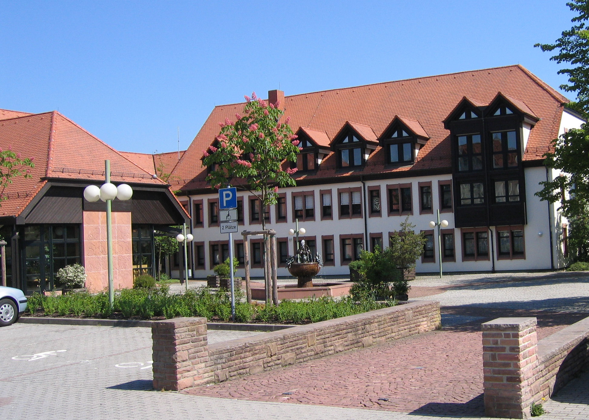 building in Enkenbach, Germany